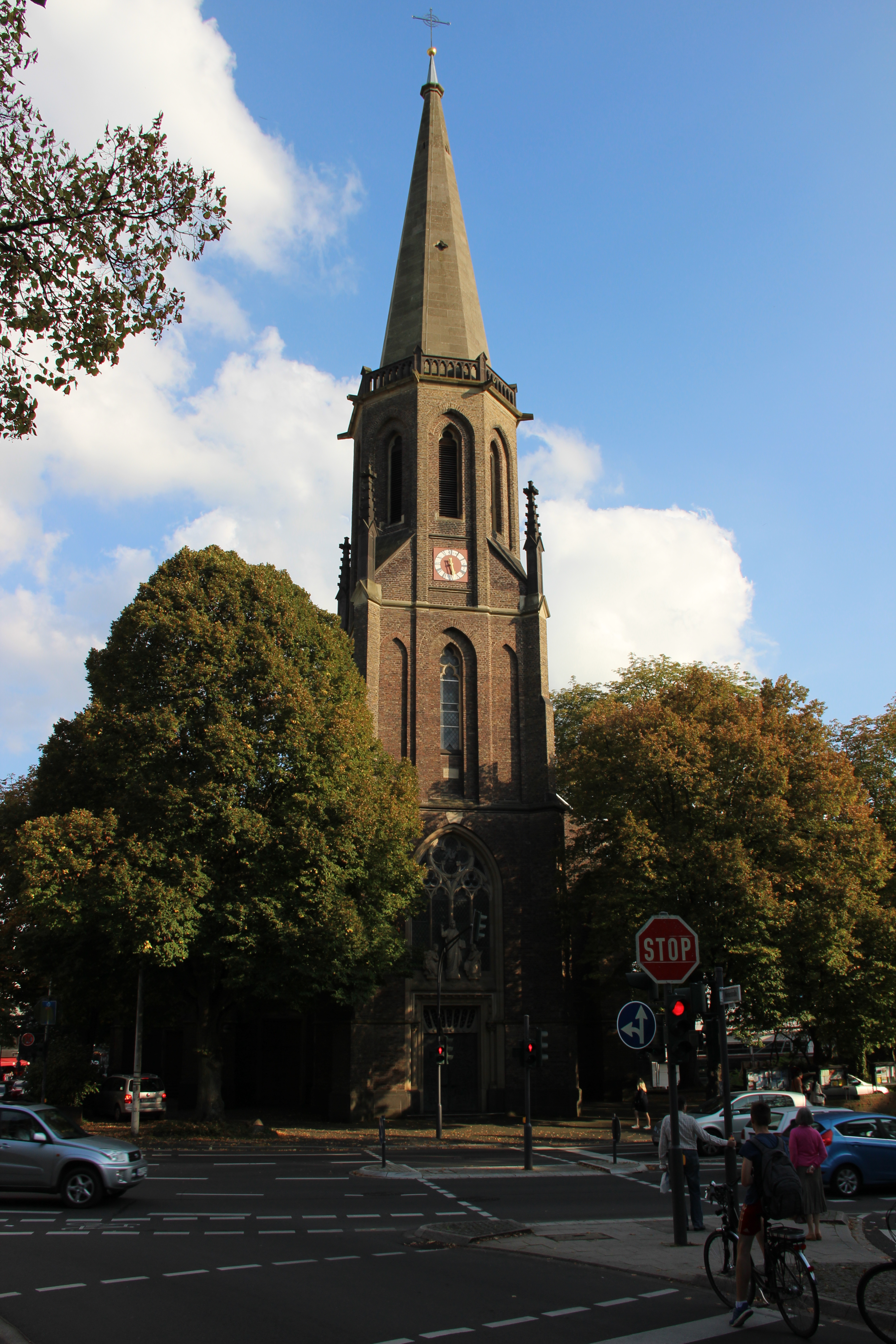 Sankt-Marienkirche in Alt-GodesbergThis is a photograph of an architectural monument. 1788